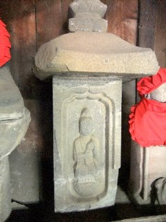 裾野市佐野原神社境内南側にある地蔵